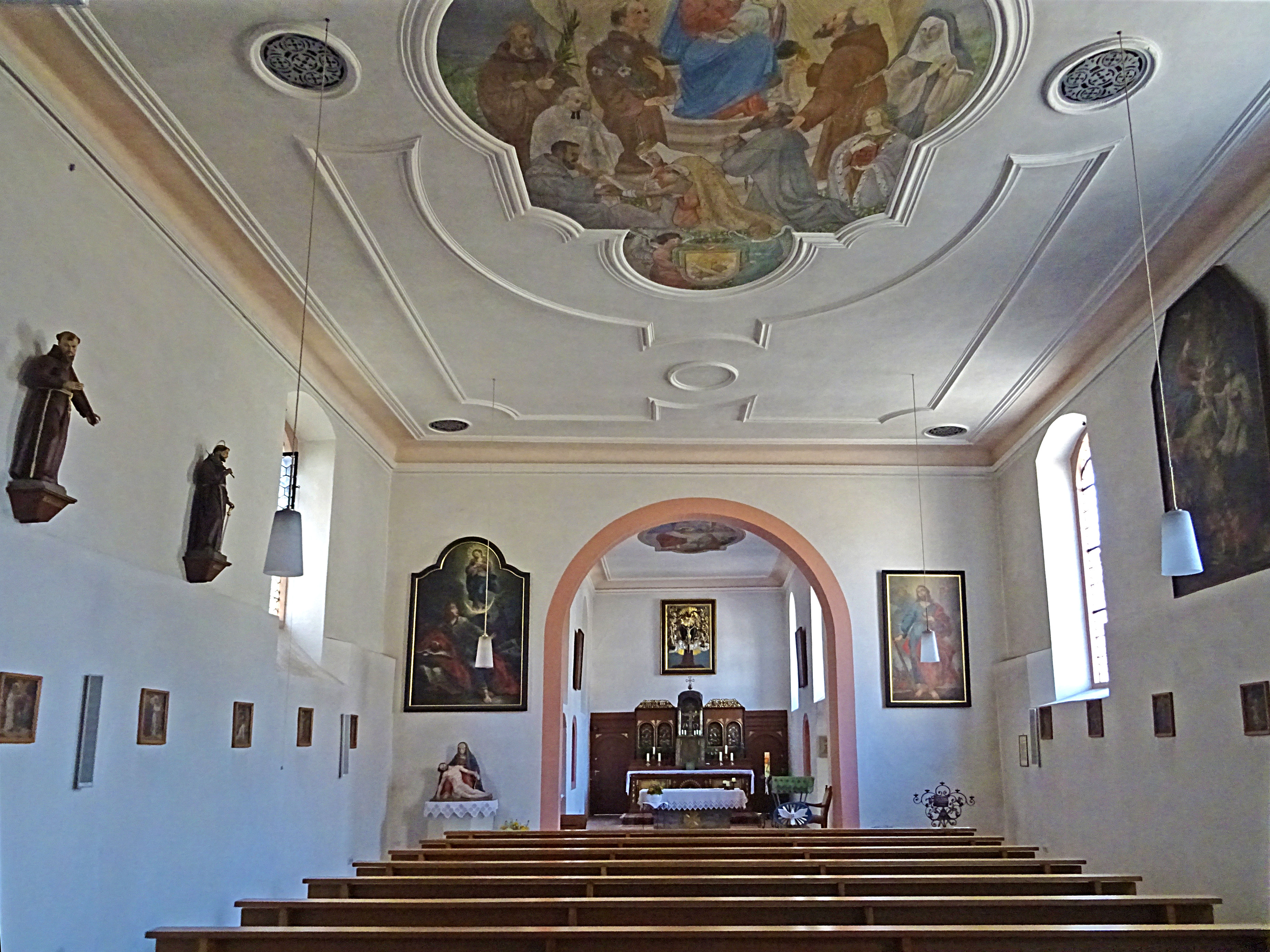 Bad Königshofen Kapuzinerklosterkirche St. Johannes Evangelista, Blick zum Altar